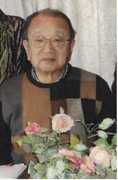 望月 明を囲む懇談会で撮影